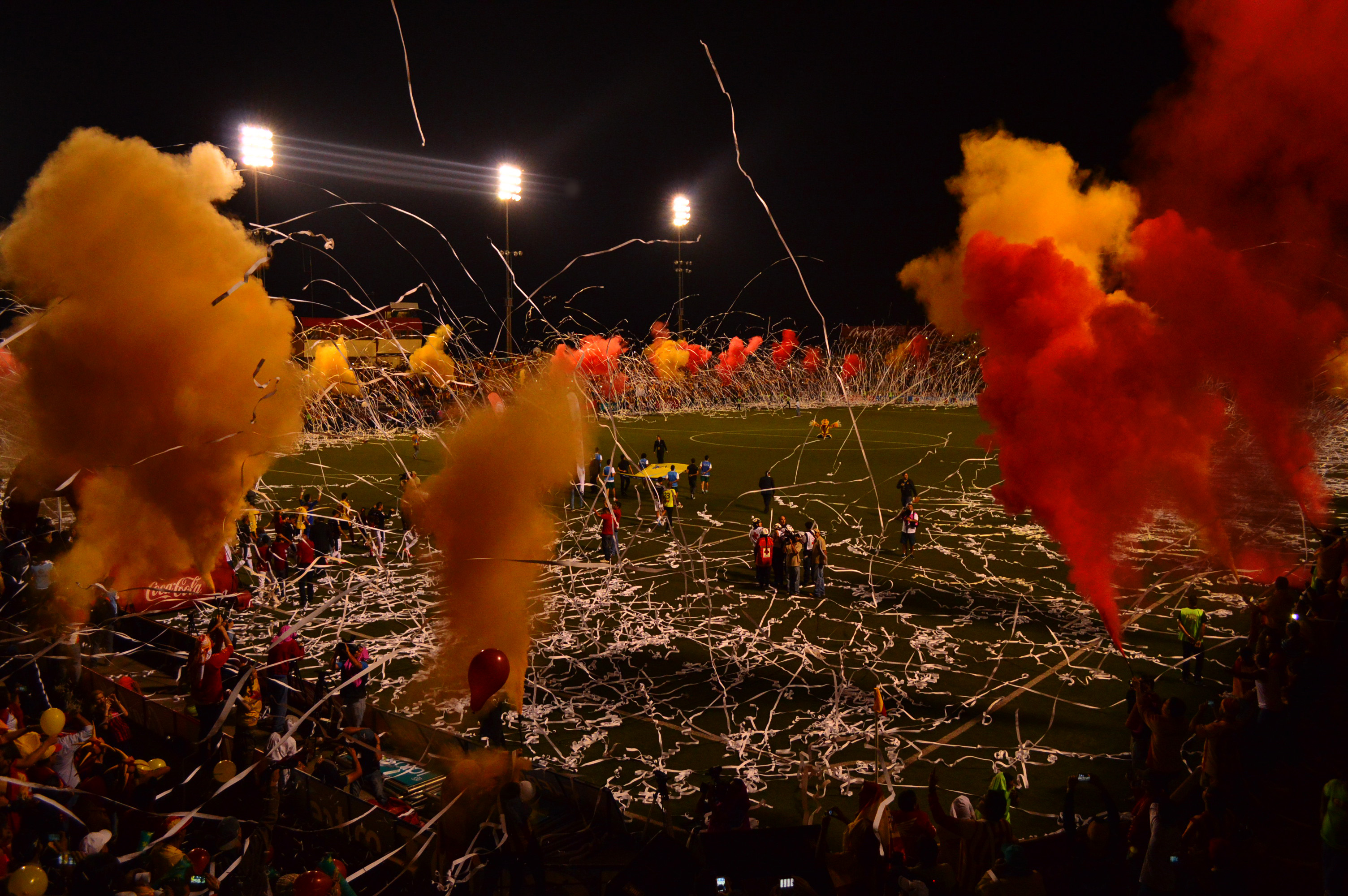 Afición del Herediano recibiendo al equipo en una final de fútbol.